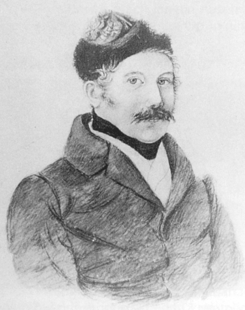 Sigmund Reinhard von Gemmingen (1819-1883), reprod. in Anne und Helmut Schüßler: Treschklingen – Vom ritterschaftlichen Kraichgaudorf zum Stadtteil von Bad Rappenau. Stadt Bad Rappenau, Bad Rappenau 2004, ISBN 3-936866-02-3, S. 48.